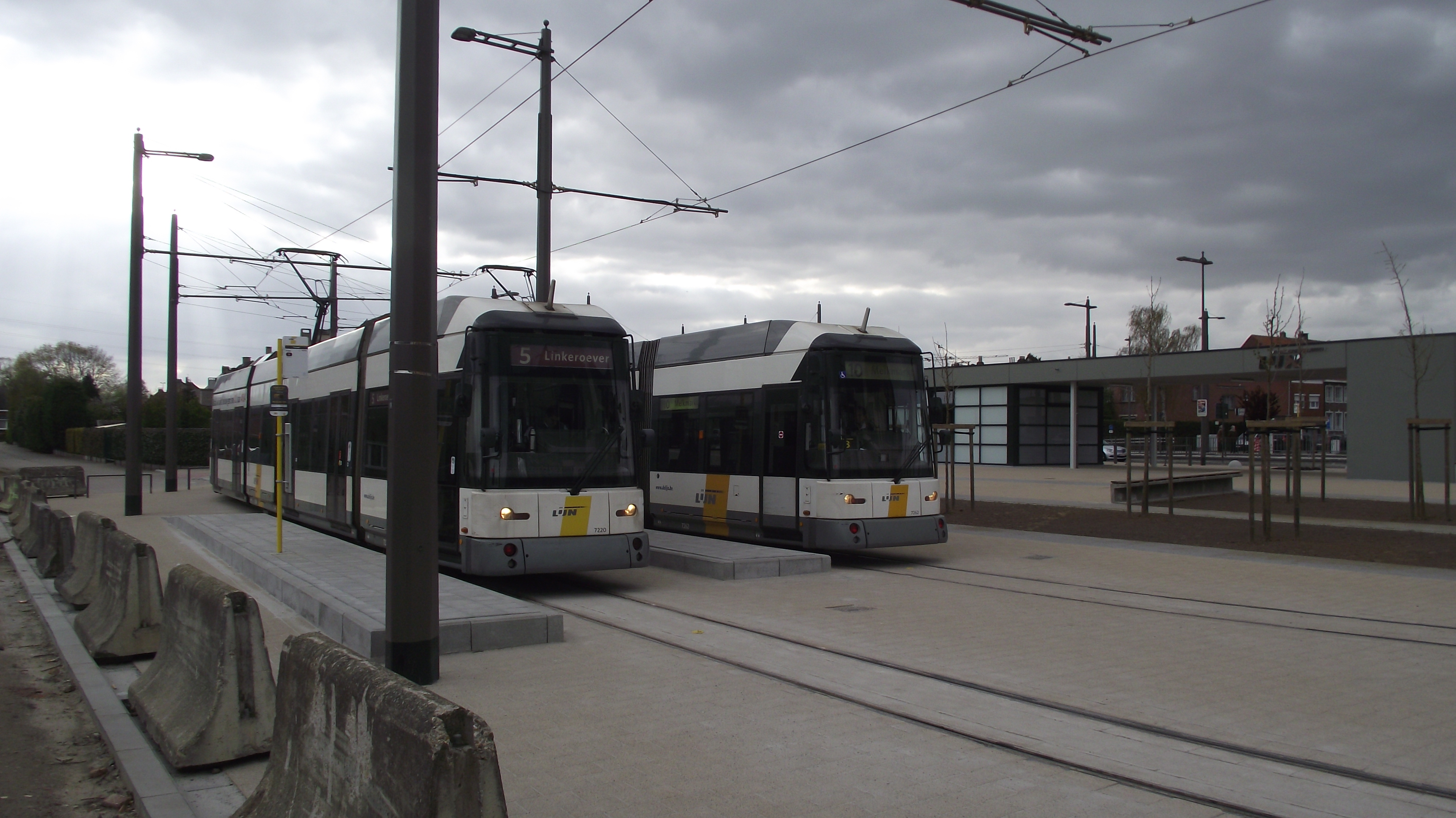 Nieuwe eindpunt Fortveld tramlijn 5 en 10 in Wijnegem